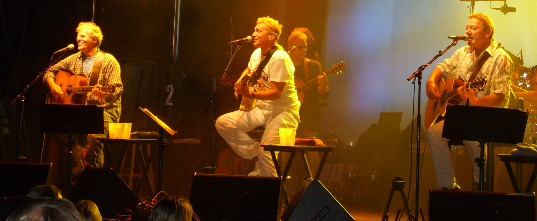 Georg Danzer, Rainhard Fendrich und Wolfang Ambros als Austria 3 live in Imst.